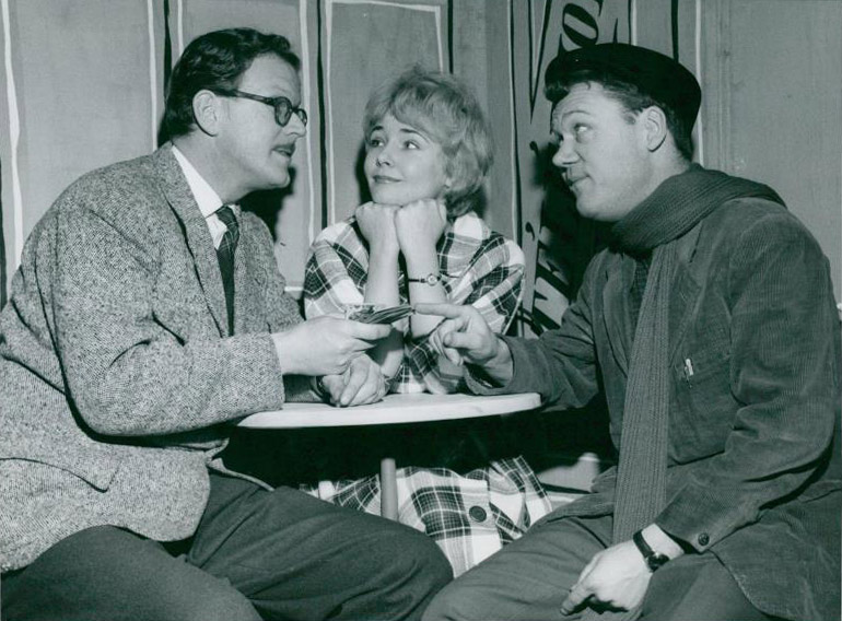 Bild- och brödtext i Svenska Dagbladet (1959-01-28 s. 11): "Vid ett bord på en trottoarservering sitter Börje Nyberg (t.v.), Lena Granhagen och Olof Thunberg, i Intimans föreställning av 'Ägget'. En fransk komedi och ett av titeln att döma mycket svenskt 'lustspex' har sina premiärer i Stockholm i nästa vecka. På onsdagen presenterar Intoma teatern 'Ägget' av Felicien Marceau och på lördagen kommer [...]"